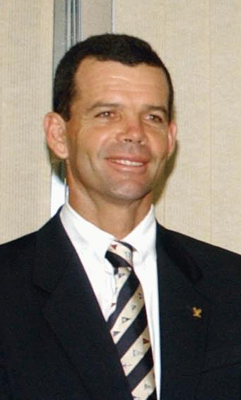 O velejador brasileiro Torben Grael.